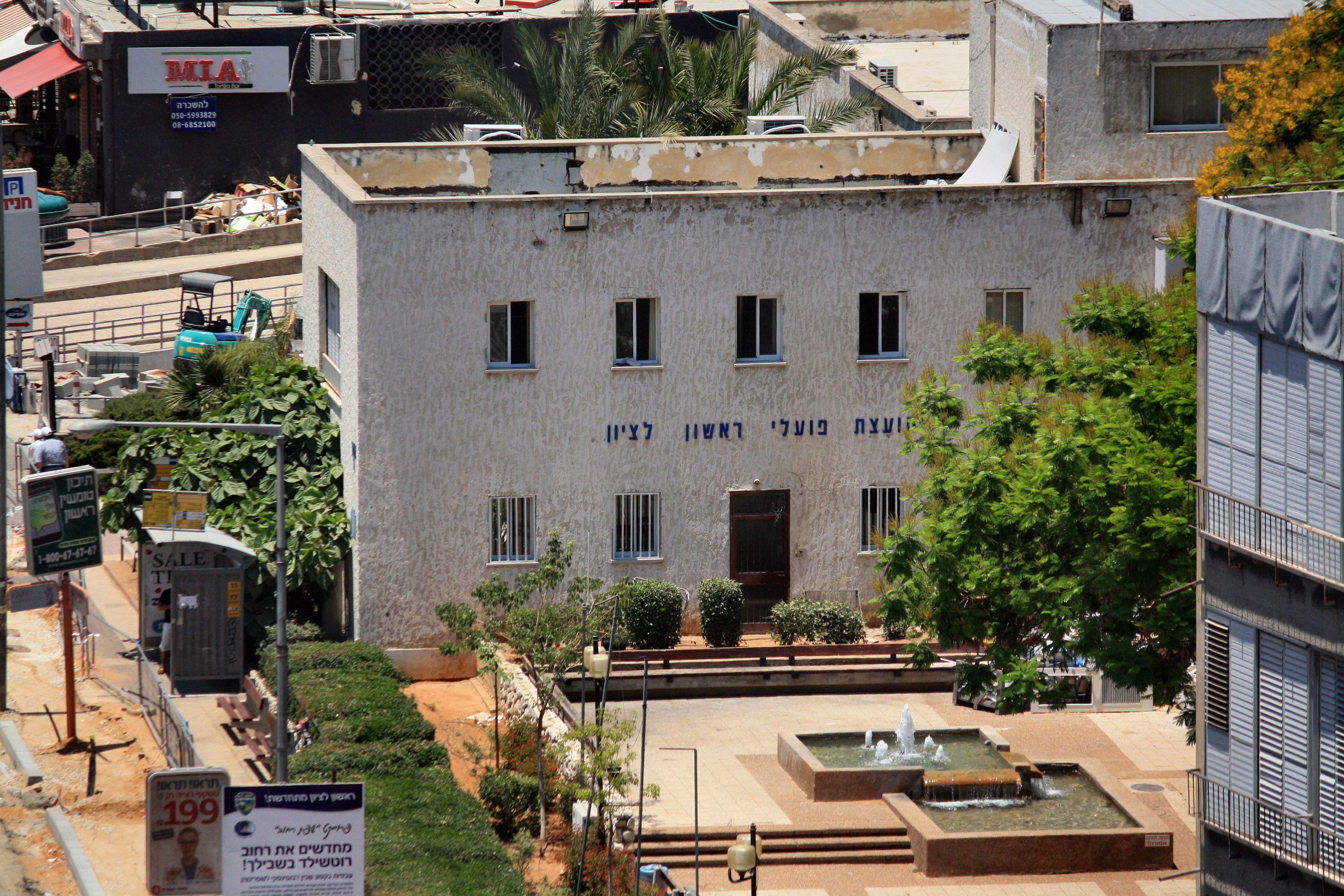 בניין ורחבת "מועצת הפועלים" בראשון לציון.